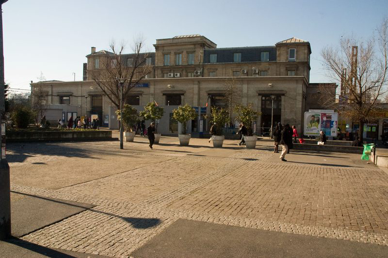 Gare de Saint-Denis